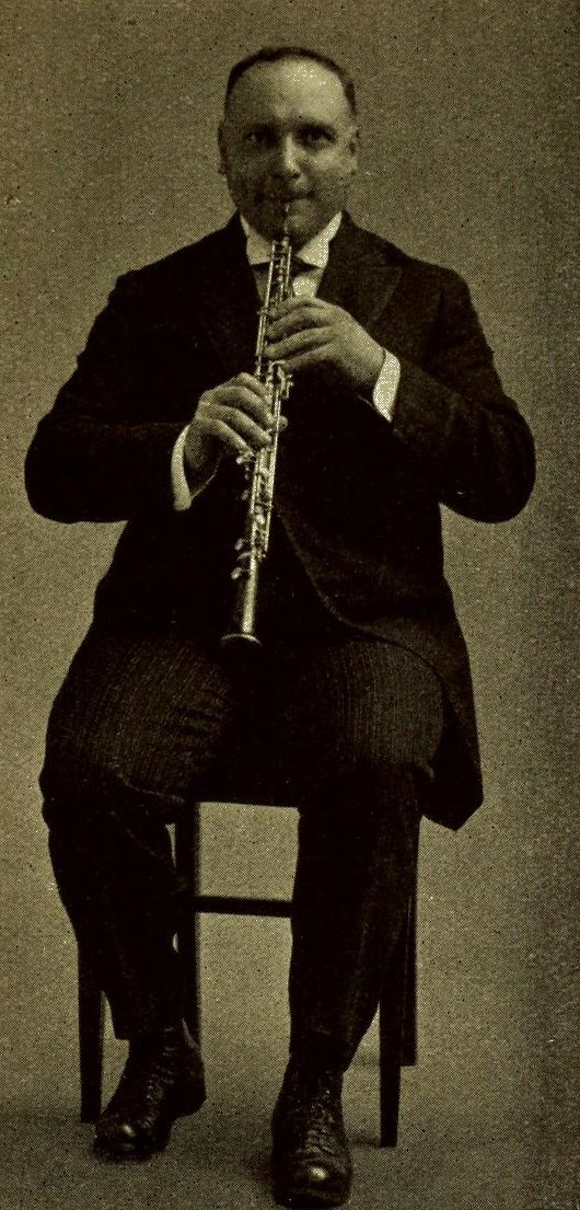 Frederick de AngelisN. Y. Philharmonic Orchestra